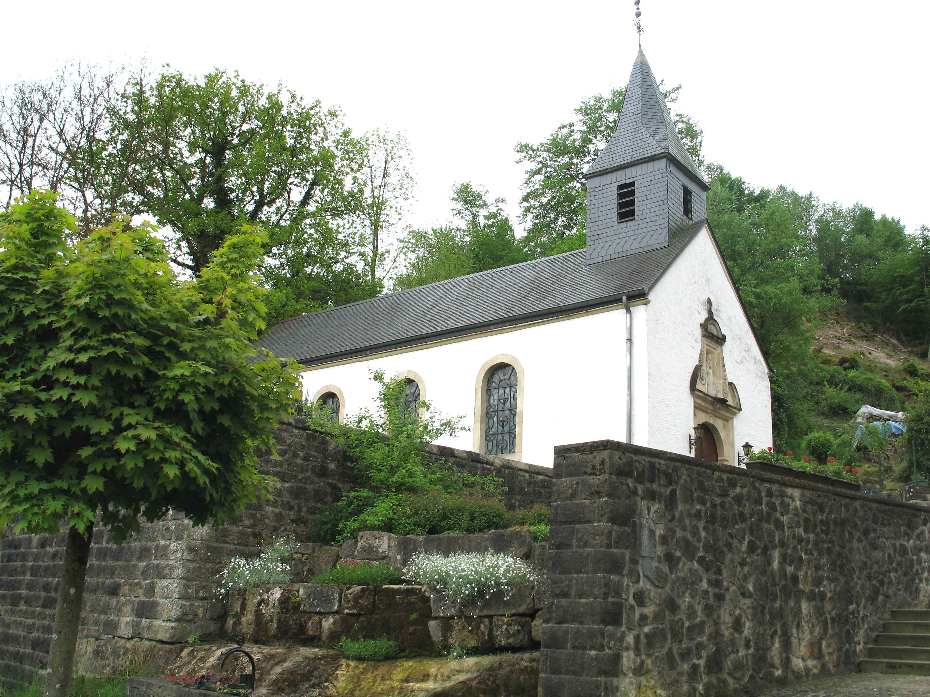 D'Kapell zu Iernzen. Iernzen Kategorie:Gemeng Fiels